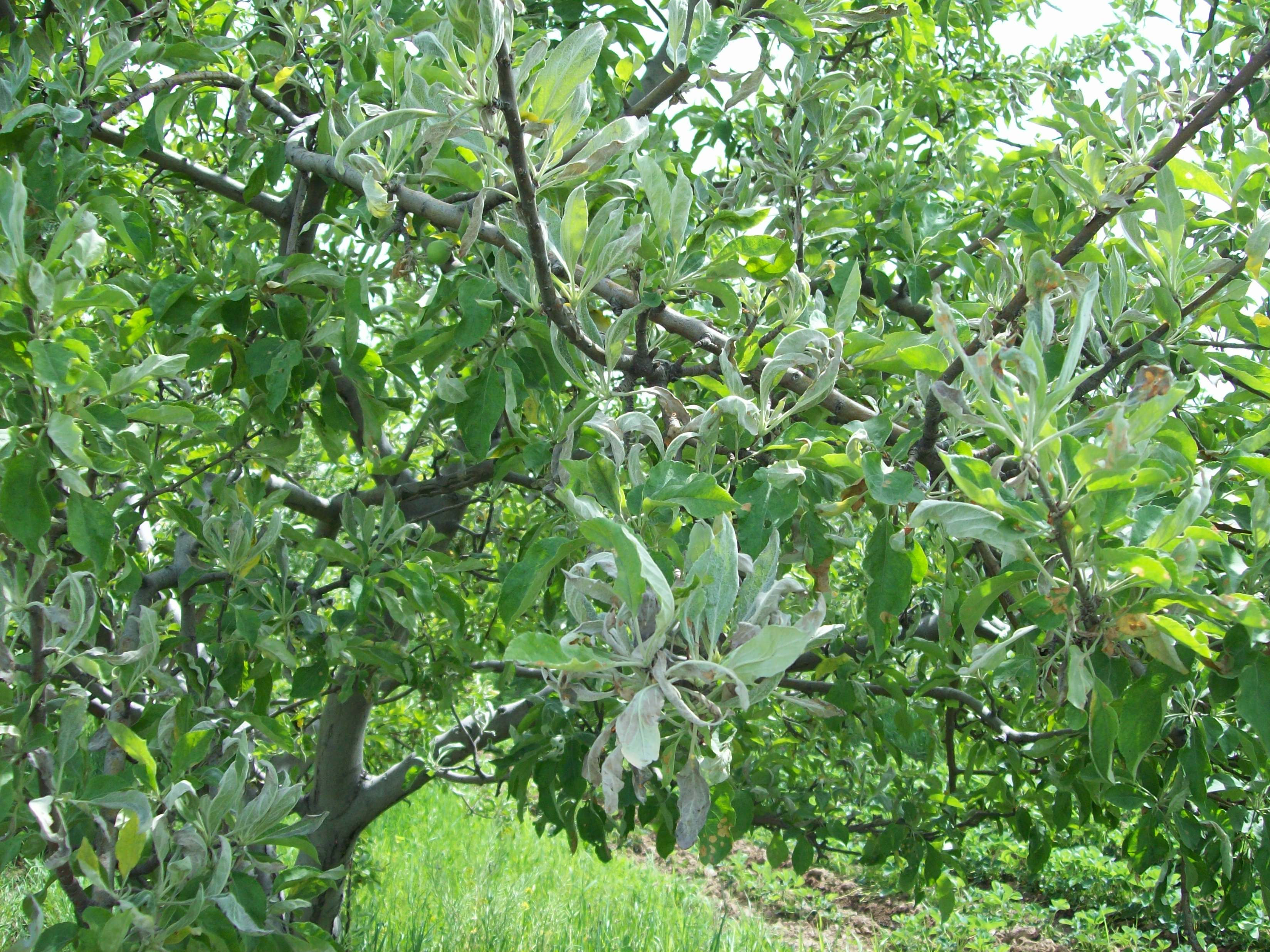 Мучнистая роса - наиболее распространенный болезнь яблони в засушливых районах его возделывания.